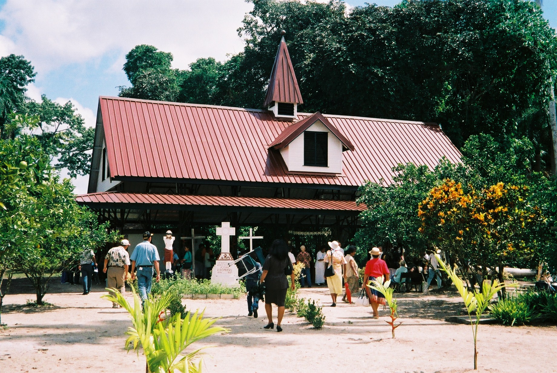 Batavia te Suriname, inwijding bedevaartskapel 18-11-2001